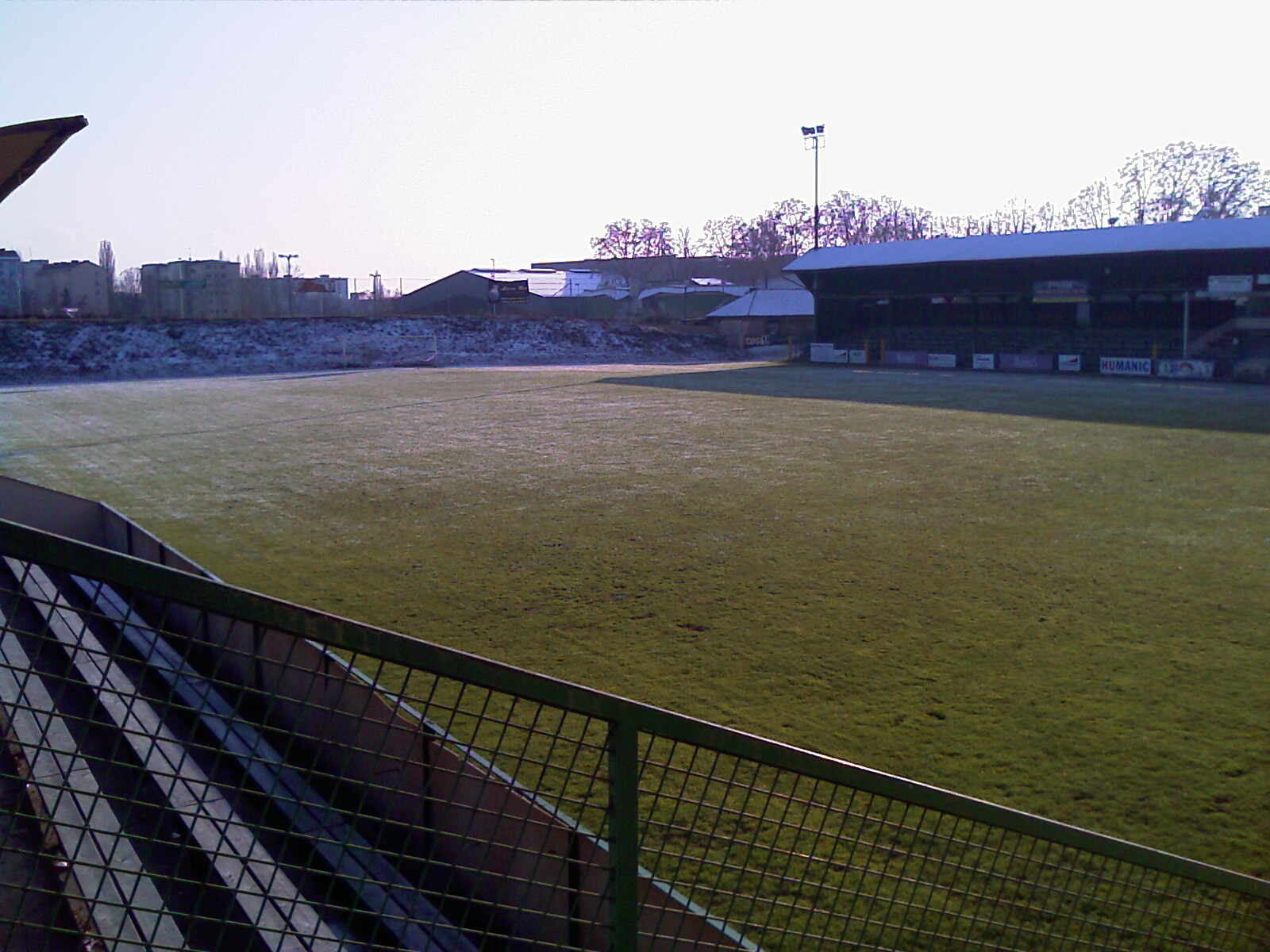 Der Grazer Fußballplatz Gruabn